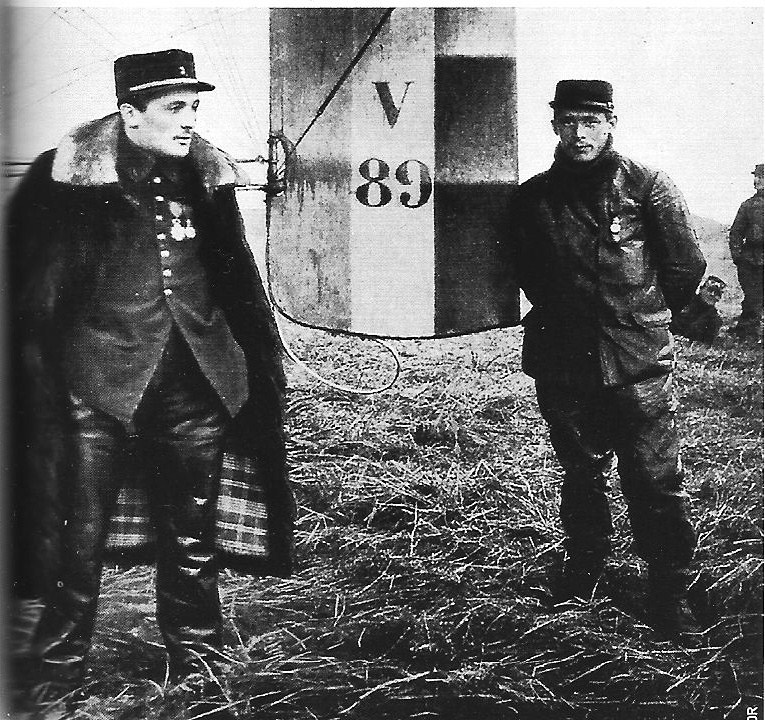 Joseph Frantz et Louis Quenault, escadrille V24, les premiers a obtenir une vivtoire en abattant un avion ennemis en vol .